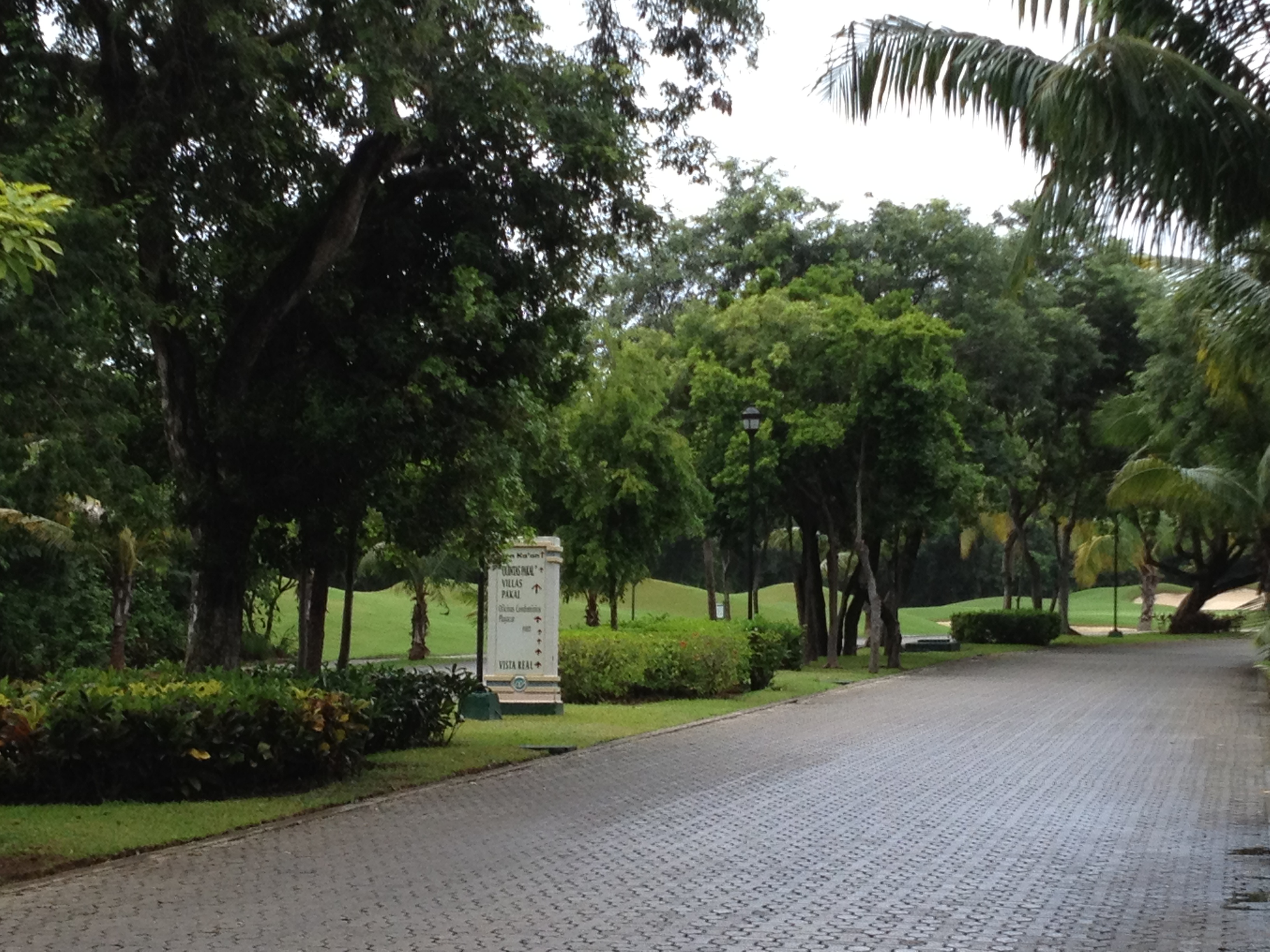 Paseo Xaman-Ha dentro del complejo de Playacar